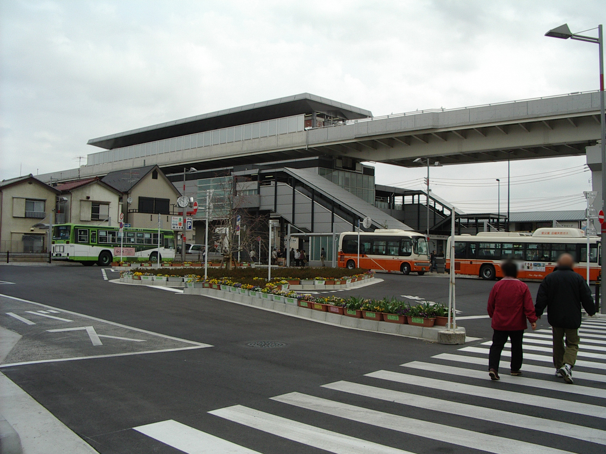 日暮里・舎人ライナー見沼代親水公園駅